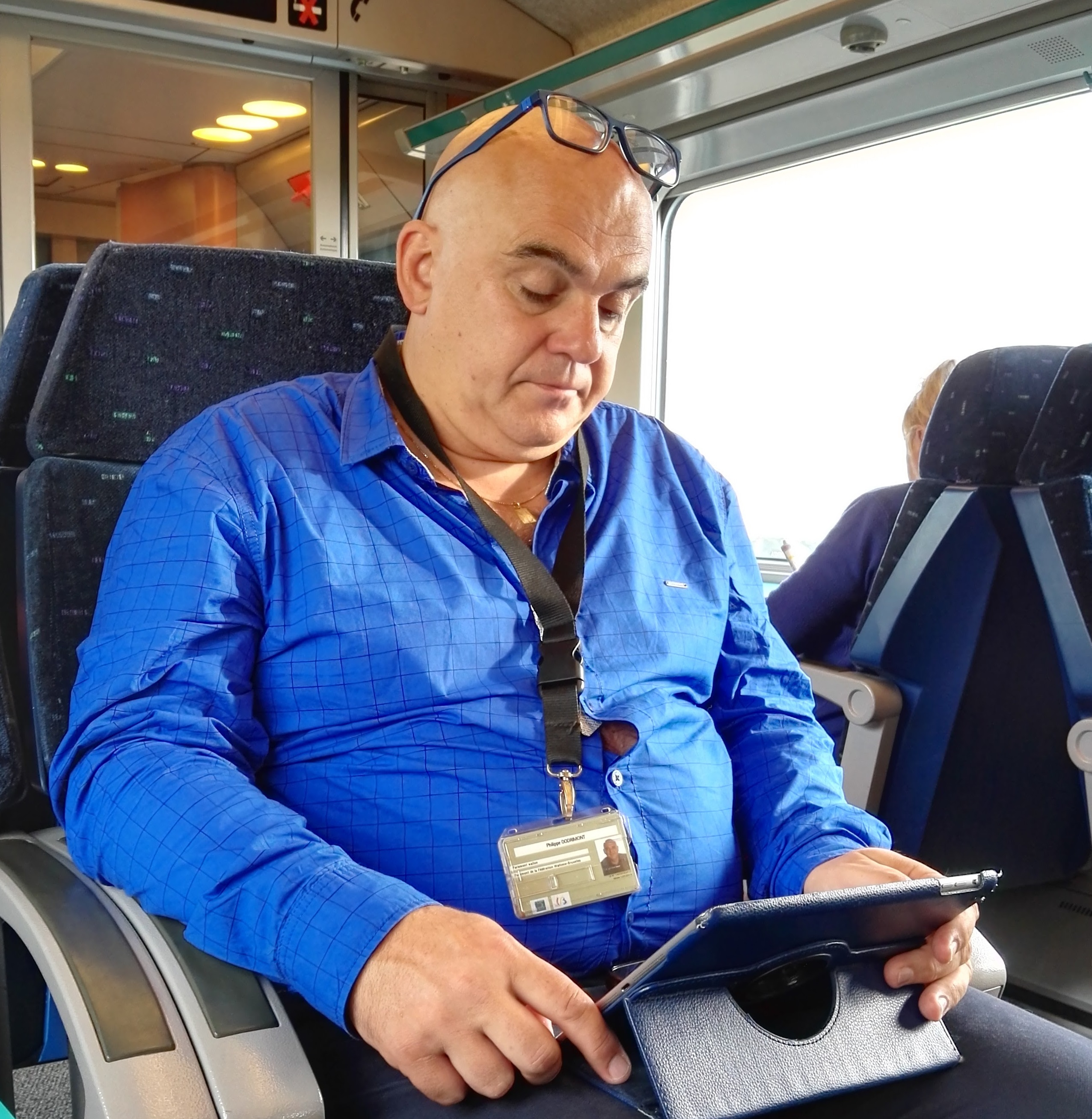 Philippe Dodrimont dans le train Liège-Bruxelles